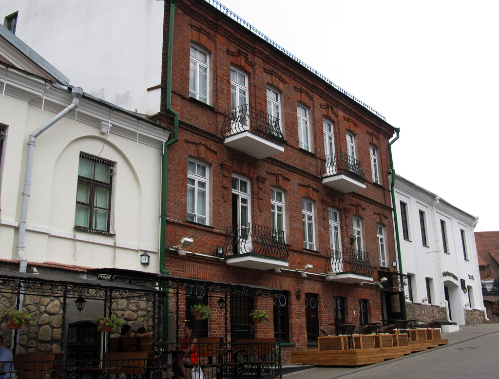 Мінск. Вуліца Герцэна, 2